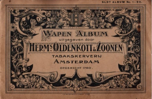 Oldenkott